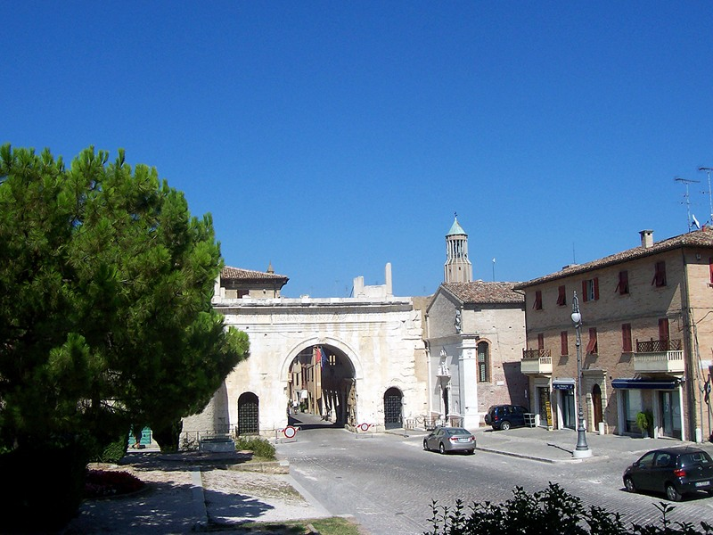 Fano - Arco di Augusto